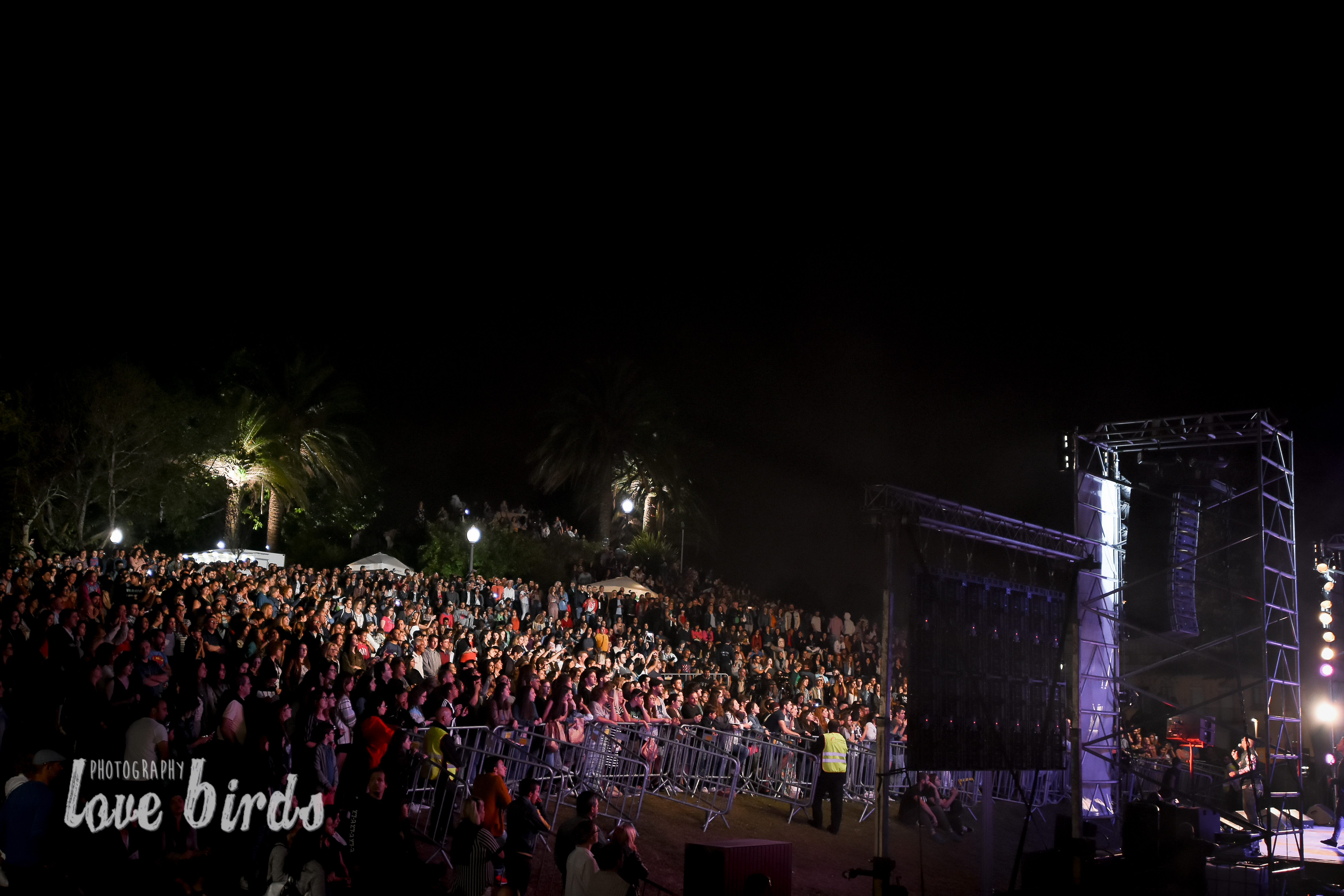 Visão do público no GodTellers 2018